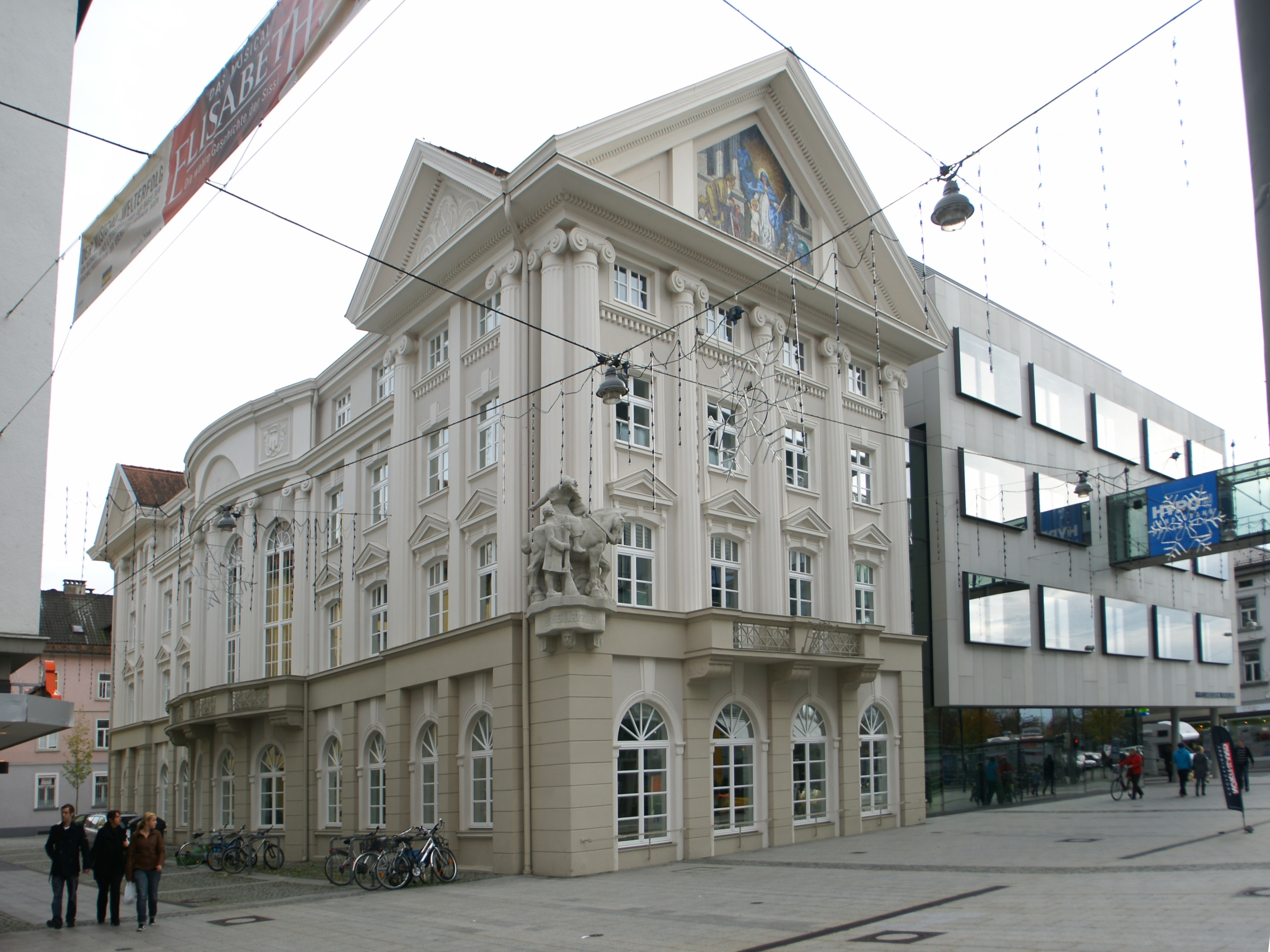 aus dem DEHIO Vorarlberg 1983: Bregenz, Bahnhofstrasse Nr.:3 - Ecke Jahnstraße: ehemals Landhaustrakt mit Landtagssitzungssaal, erbaut von Willibald Braun, 1921. Neoklassizistisch, 4geschossig, Giebelfront zur Bahnhofstraße mit ionischen Halbsäulen, Beletage mit Balkon und Dreieckgiebelverdachungen, Giebelmosaik von “Joseph Huber-Feldkirch”, 1923, Eckplastik Ehreguta von “Josef Piffrader”, 1923. Zur Jahnstraße in flachem Bogen risalitartig vorspringender Mittelteil, Seitenteile übergiebelt.